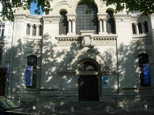 Façade Grand Temple Lyon